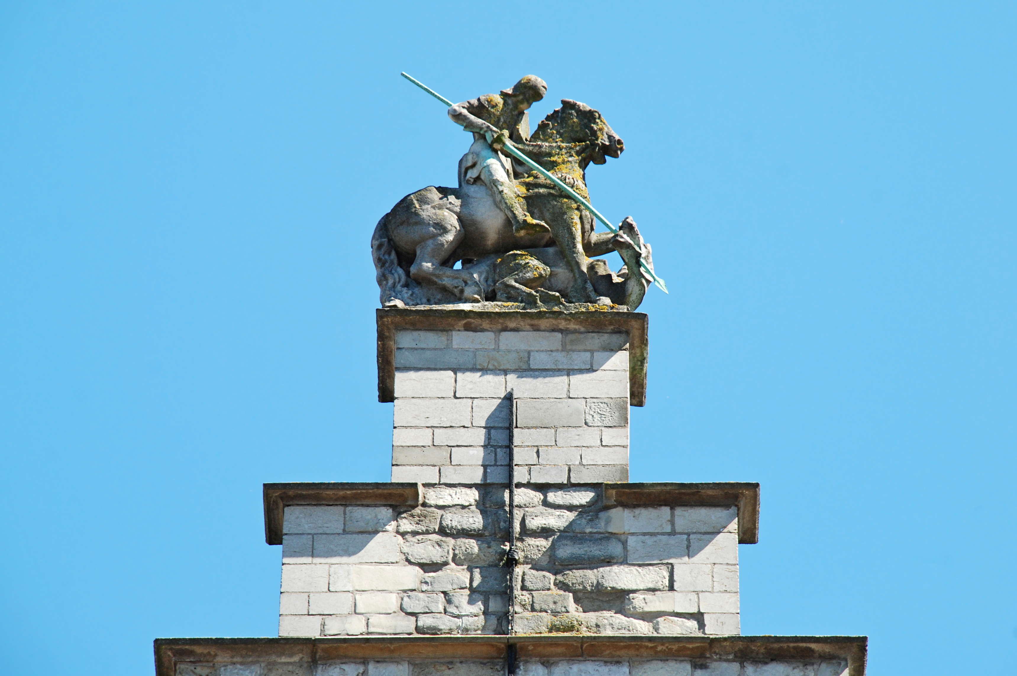 Belgique - Gand - Cour Saint-Georges (gothique 1477)